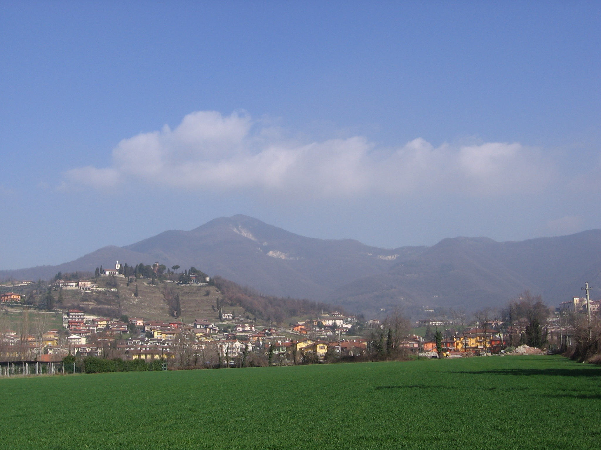 Cenate Sotto, Bergamo, Italy